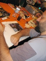 Vincent Pompetti en dédicace au salon du livre de Caen 2007 (stand du mémorial de Caen)